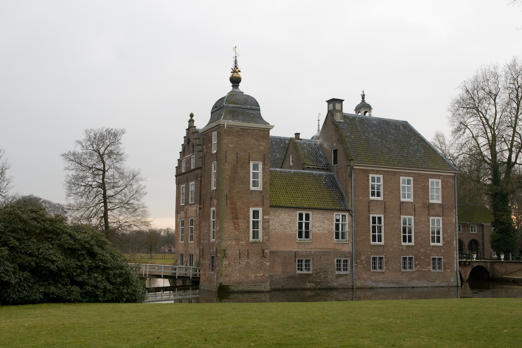 Het Trappenhuis uit de televisieserie nav het boek De Zevensprong. Huize Ruurlo.